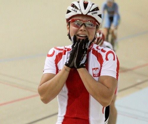 I miejsce na Mistrzostwach Europy w portugalskiej Anadii